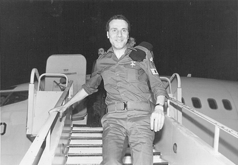 השבוי חזי שי חוזר מהשבי במסגרת עסקת ג'יבריל